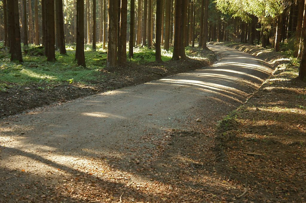 Feinschotterweg (hell)/ Wassergebundene Decke aus Taunusquarzit - gut erkennbar: konvexer Querschnitt, Entwässerungsgräben seitlich, Beispiel für OSM Tag surface=fine_gravel